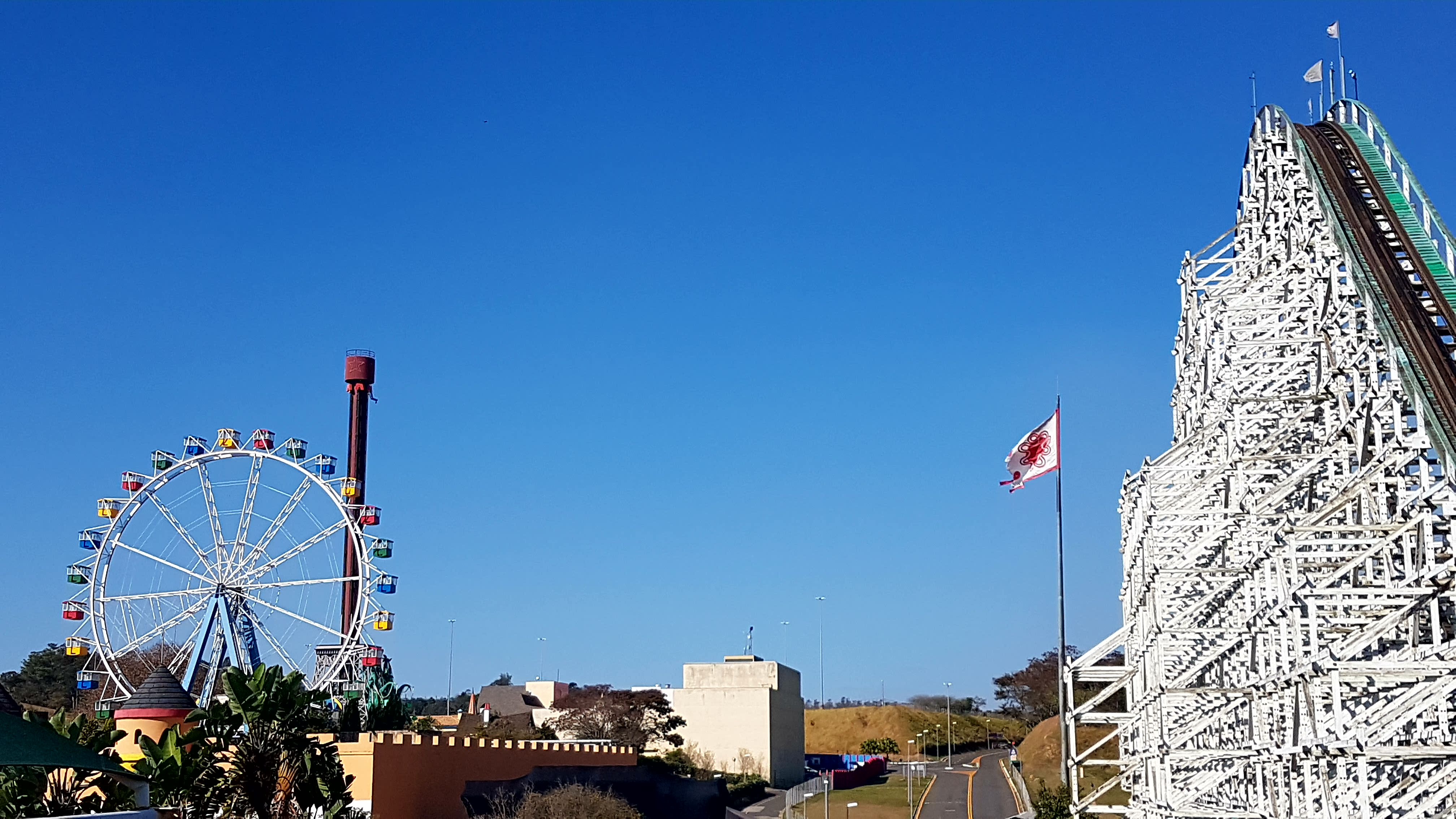 Vista da fila da Montezum